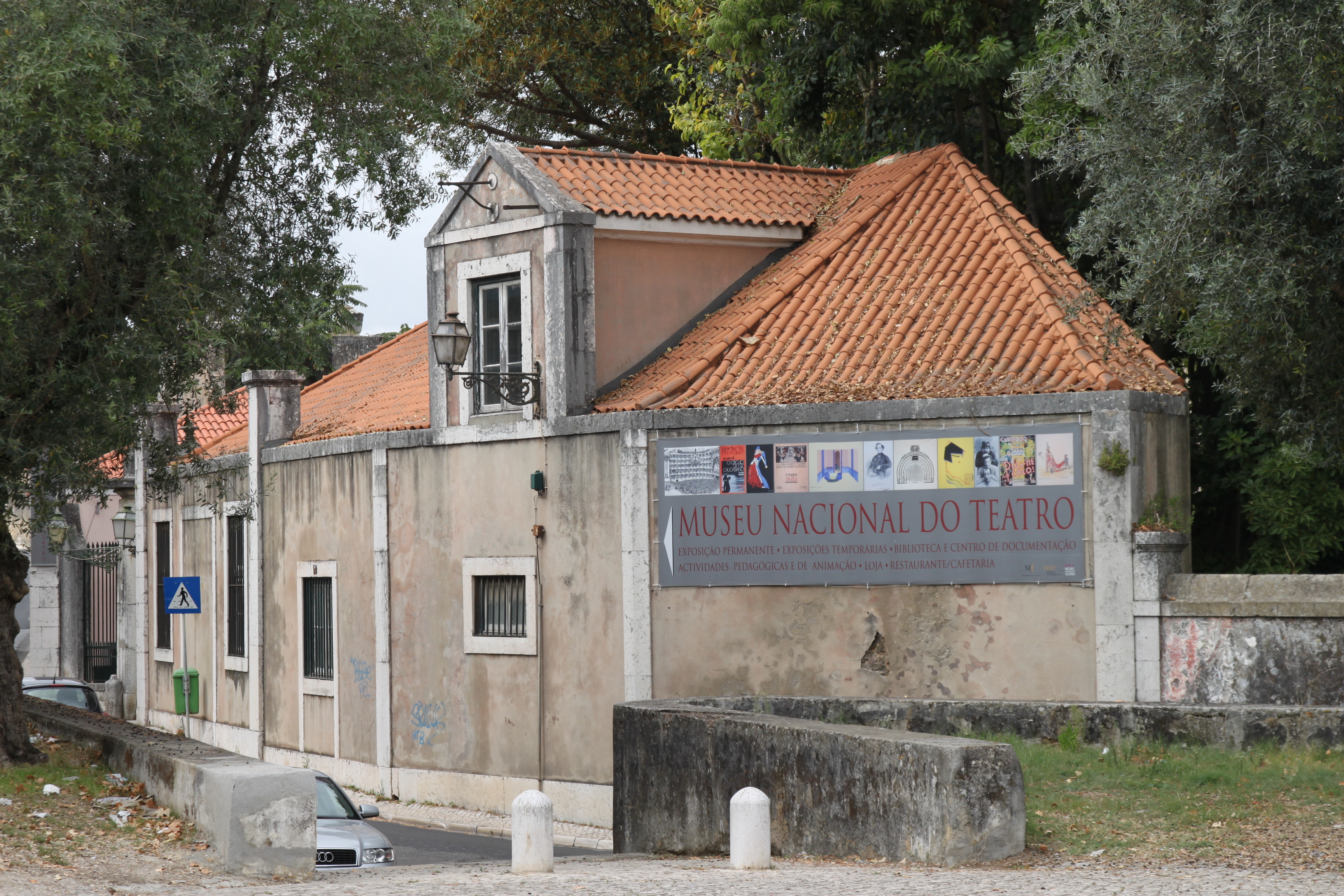 Palácio do Monteiro-Mor This file was uploaded for Wiki Loves Monuments in Portugal with the unique identifier 74720.